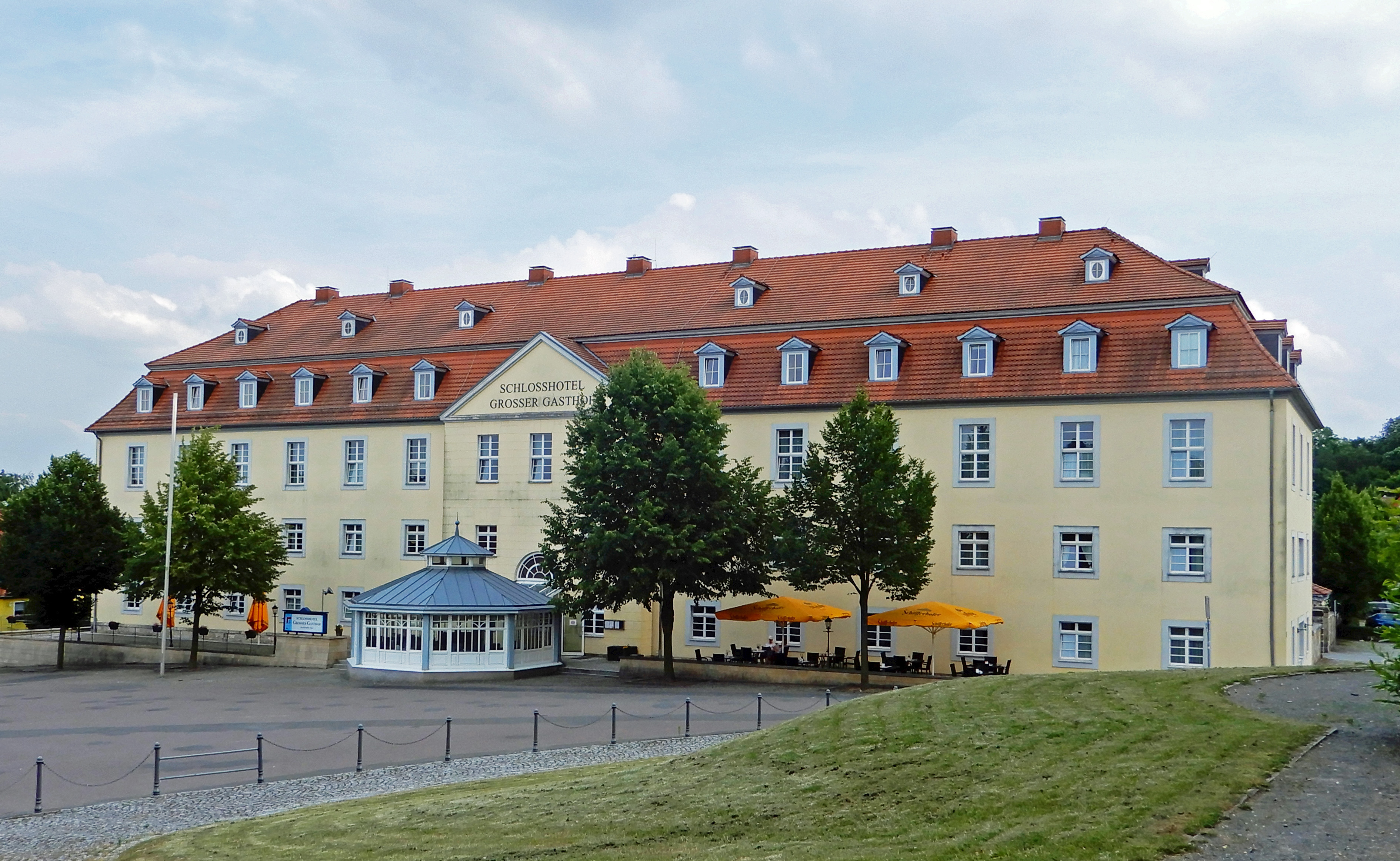 Schlosshotel Ballenstedt, 1997 nach altem Vorbild neu errichtet